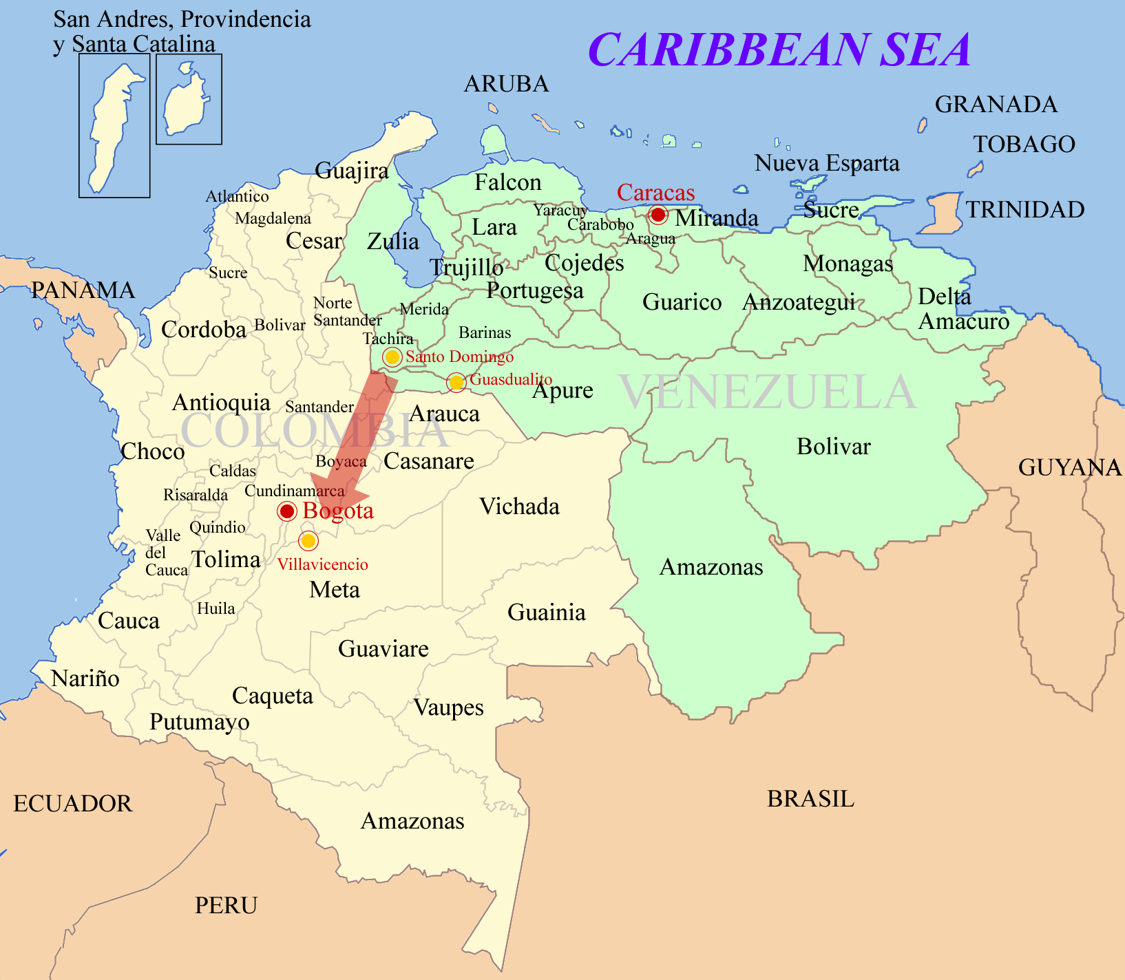 Mapa Colombia Venezuela operacion emanuel fase 1